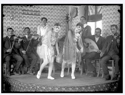 Фотографија од 1893 година, од битолскиот фотограф Анастас Лозанчев. Претставува група ученици од француското училиште во Прилеп